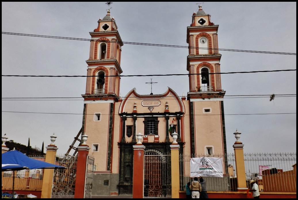 Parroquia de la Santa Cruz. Tlacotepec, Puebla, México.